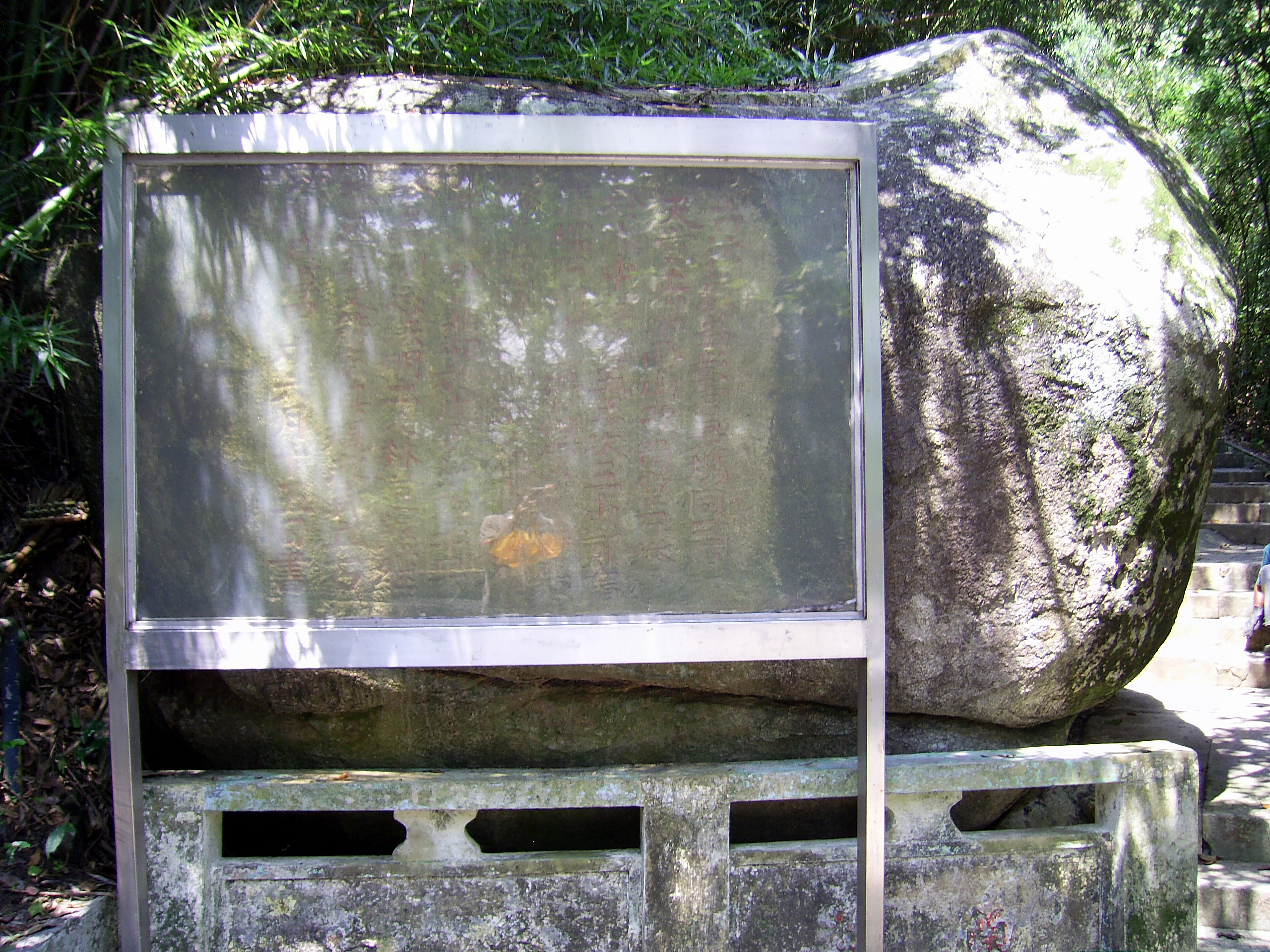 中文（香港）: 大廟灣刻石